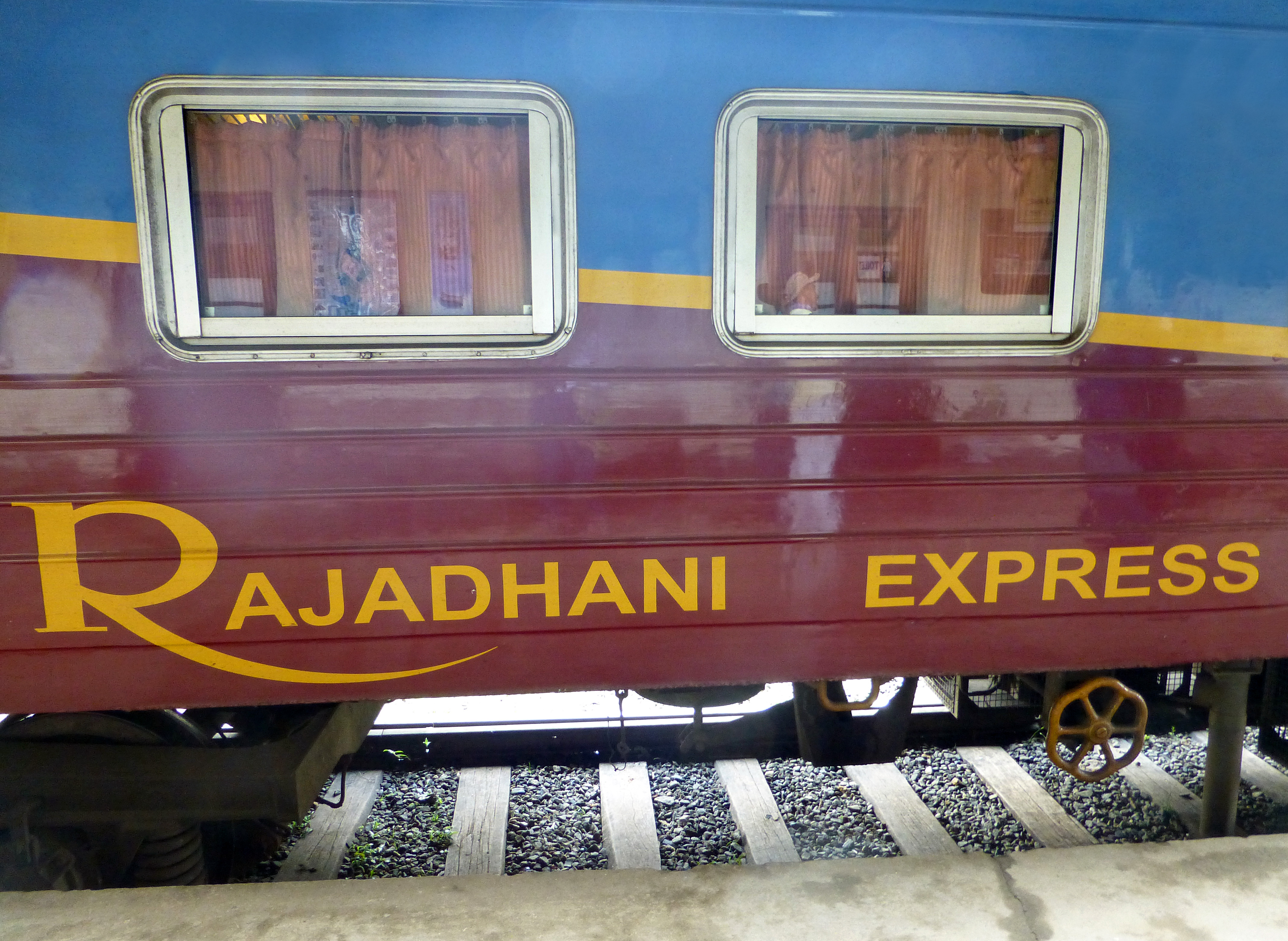 Sri Lanka, Province d'Uva : gare d'Ohiya